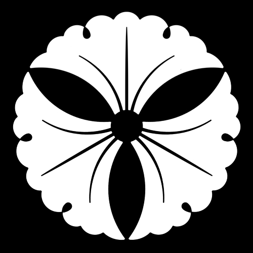 「三ツ銀杏」紋（染抜）